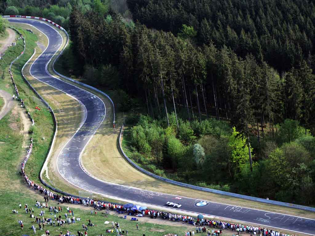 Trozo de pista del circuito de Nordschleife